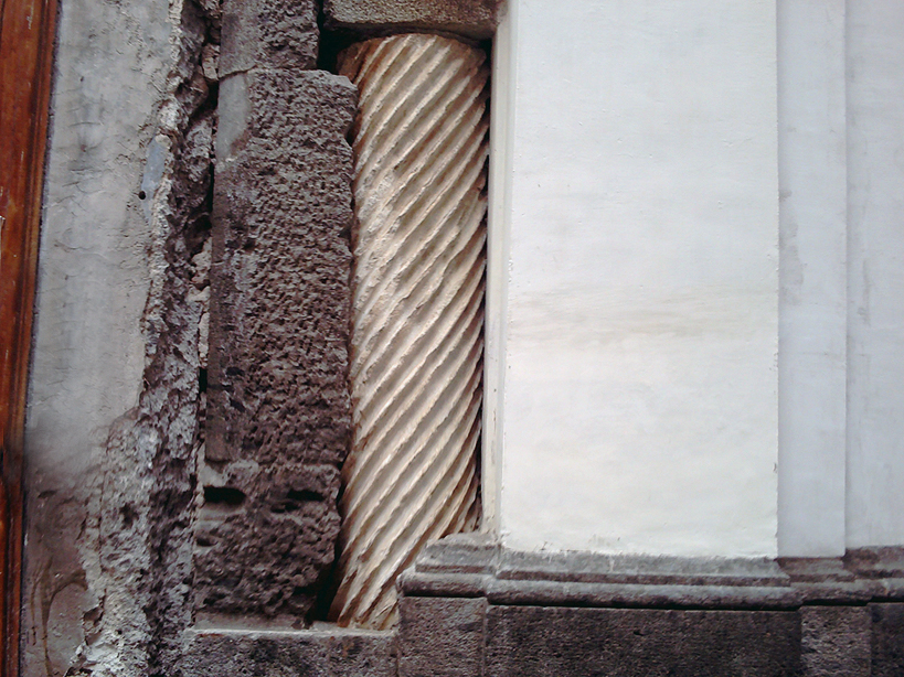 Colonna greca-romana di Santa Maria Assunta dei Pignatelli (Napoli)